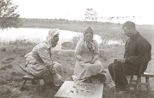 Jaakko Sverloff pelaa paaskopeliä Gauriloffin naisten kanssa